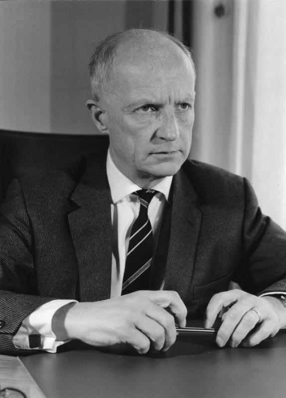 Volkmar Hopf, Staatsekretär unter Strauß (22.10.59-9.6.64)